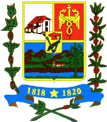 Escudo del municipio Valera, estado Trujillo, Venezuela